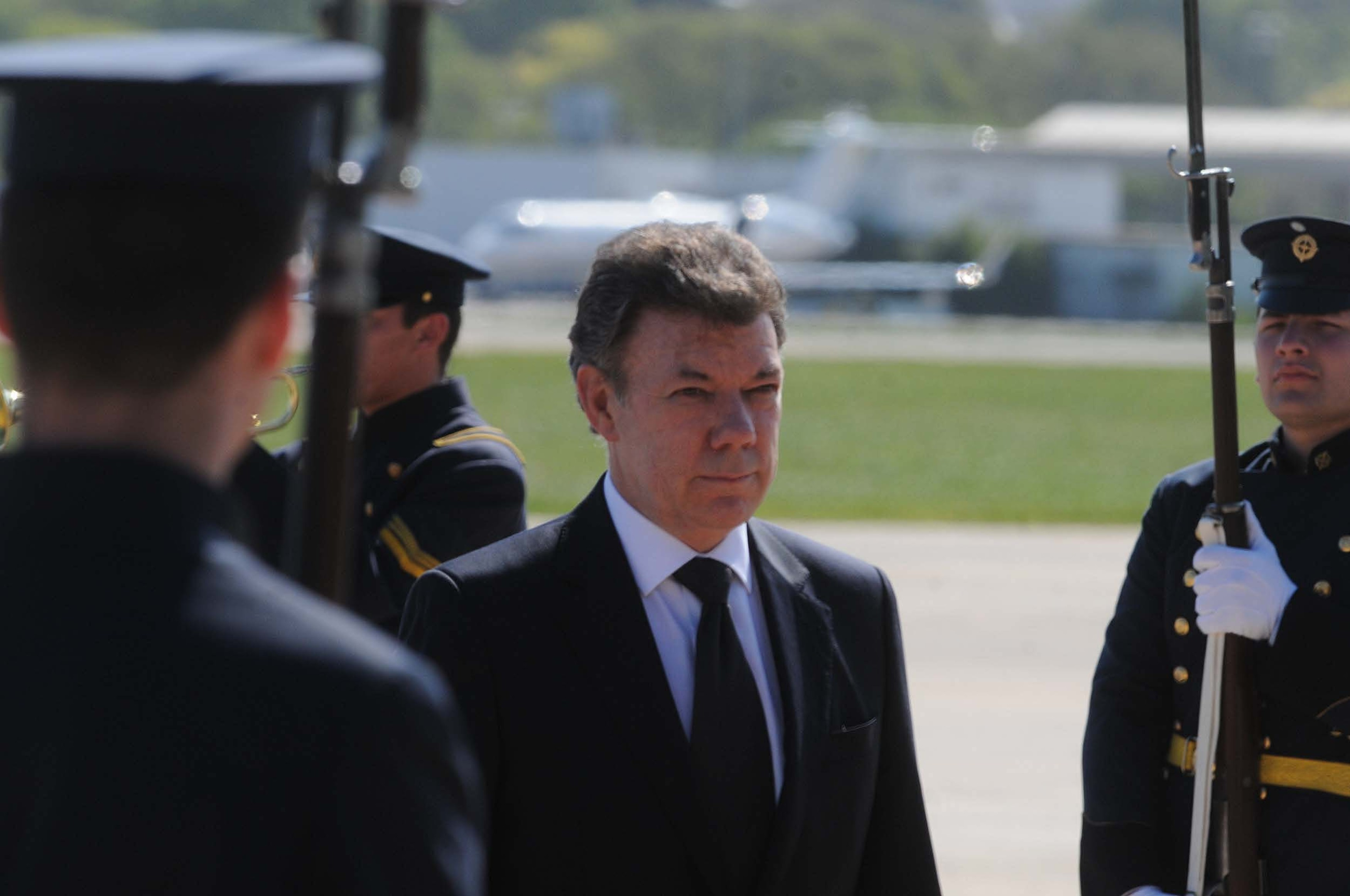 El Presidente de Colombia Juan Manuel Santos llega a Buenos Aires para el funeral de Nestor Kirchner